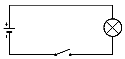 eenvoudige stroomkring met één lampje en één schakelaar